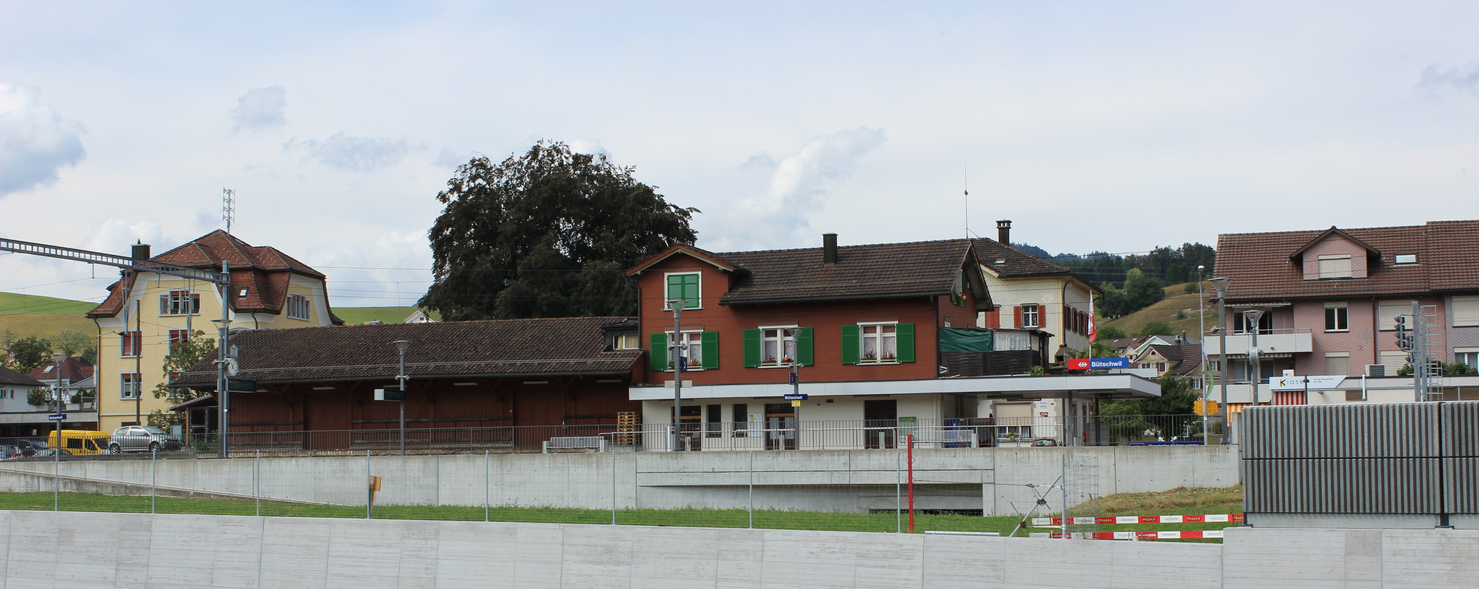 Bahnhof Bütschwil, Schweiz